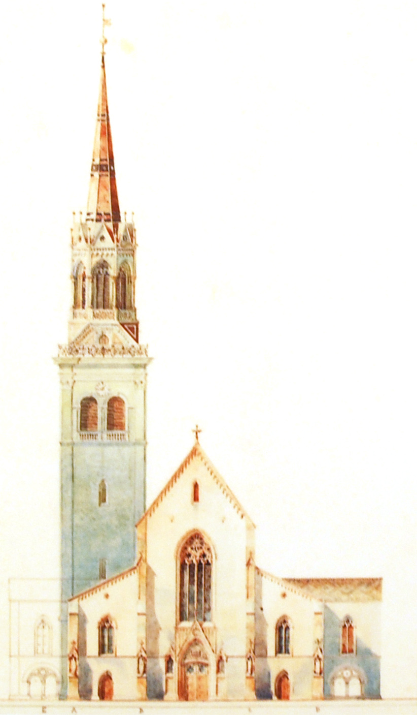 Restaurationsprojekt von Johann Georg Müller für die Kirche St. Laurenzen in St. Gallen. Das Konzept wurde weitgehend umgesetzt, obwohl er die Realisation nicht mehr erlebte.